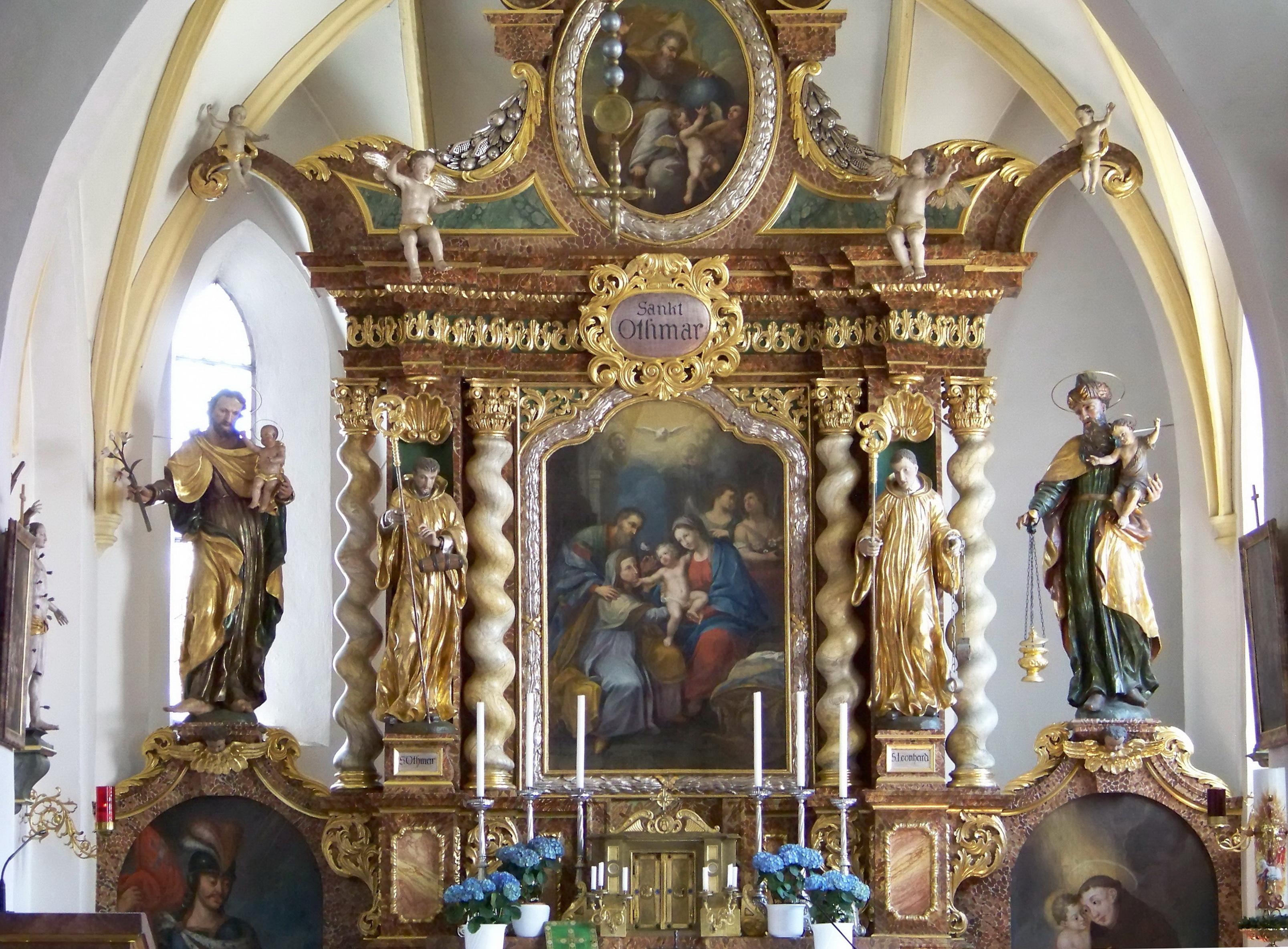 Altdorf bei Landshut. Pfettrach, Pfeffenhausener Straße 21. Katholische Filialkirche St. Othmar, Tor und Seelenhaus. Saalkirche mit eingezogenem Chor, um 1500. Barockisiert. Hochaltar mit vier gewundenen Säulen. Altarblatt hl. Familie. Seitenfiguren St. Othmar und St. Leonhard. Ovalbild von Gottvater im Gebälk.